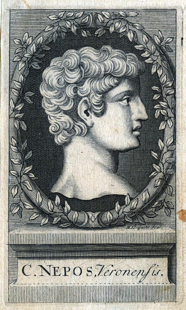 Cornelio Nepote in una litografia dell '800.